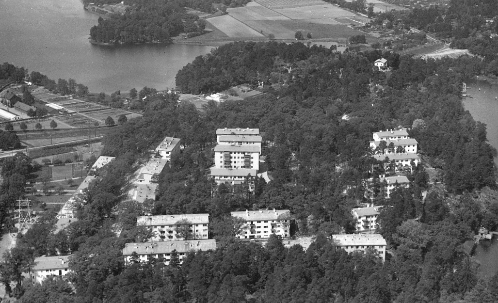 Ekhagen från luften, vy mot norr med Ålkistan i bakgrunden.